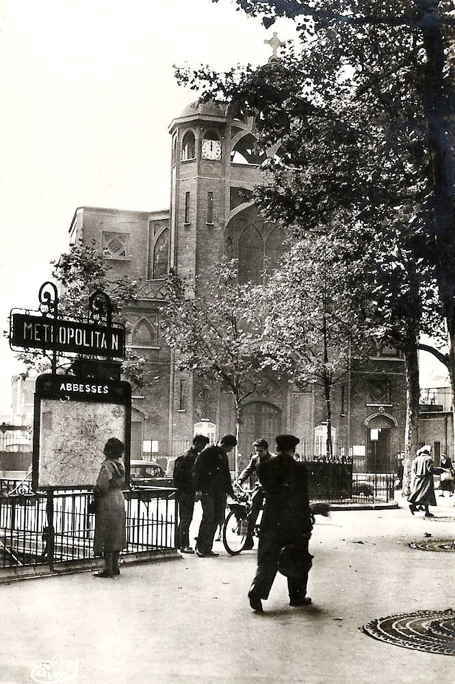 Entrée de la station Abbesses, sur la ligne 12, avant que ne soit installé l'édicule Guimard en provenance de la station Hôtel-de-Ville.